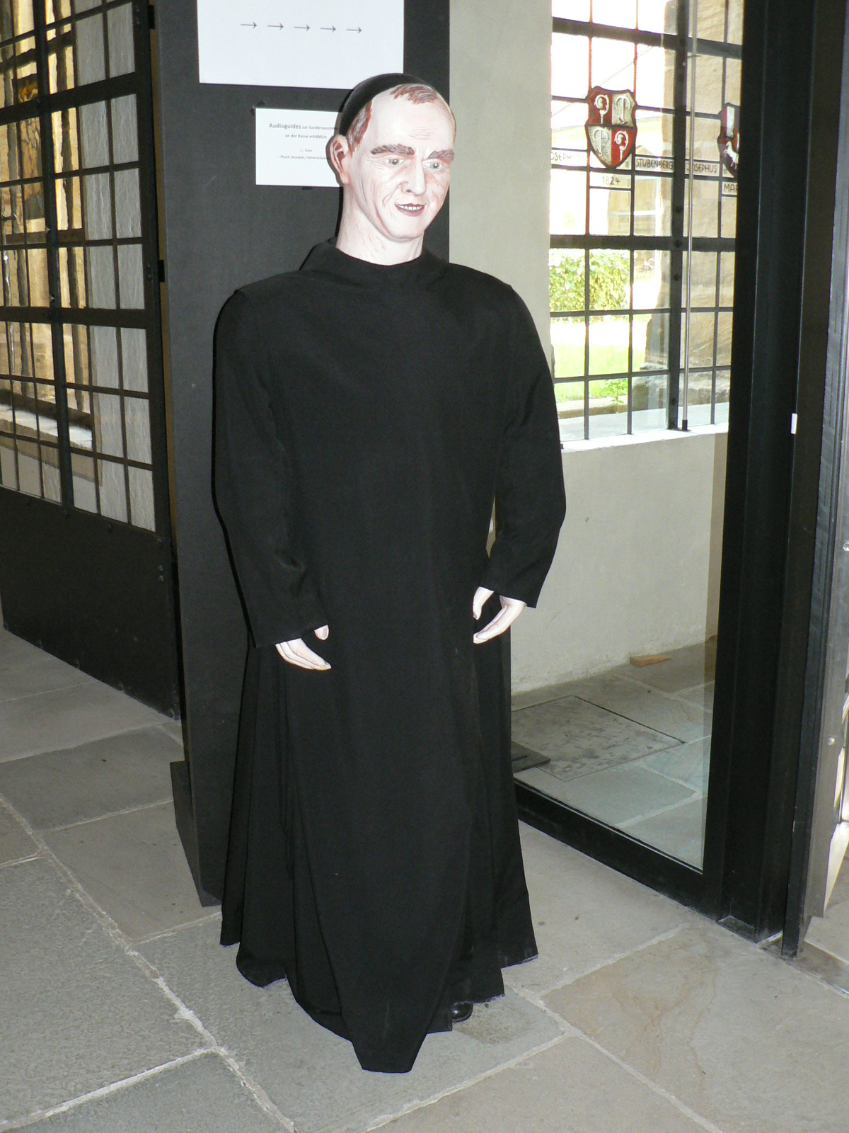 Nachbildung Valentin Rathgebers anlässlich der Ausstellung im Diözesanmuseum Bamberg (Valentin Rathgeber Gesellschaft, Berthold Gaß)